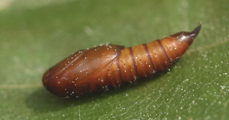 Archips xylosteana, 9 mm lange Puppe am 22. Mai 2020